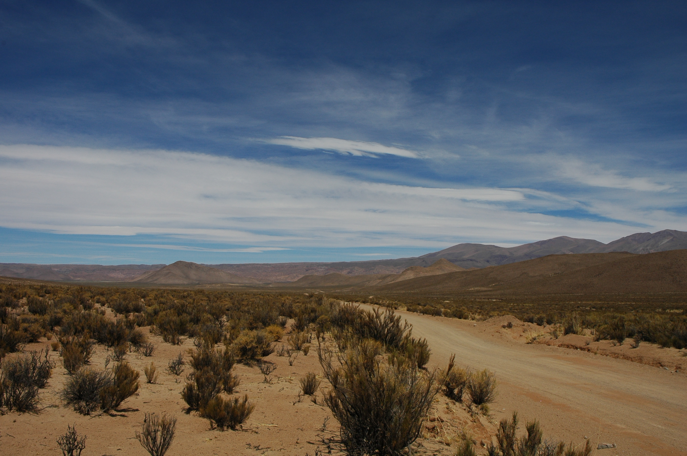 Сухий Чако на південь від Абра Пампа, пров. Жужуй, Аргентина